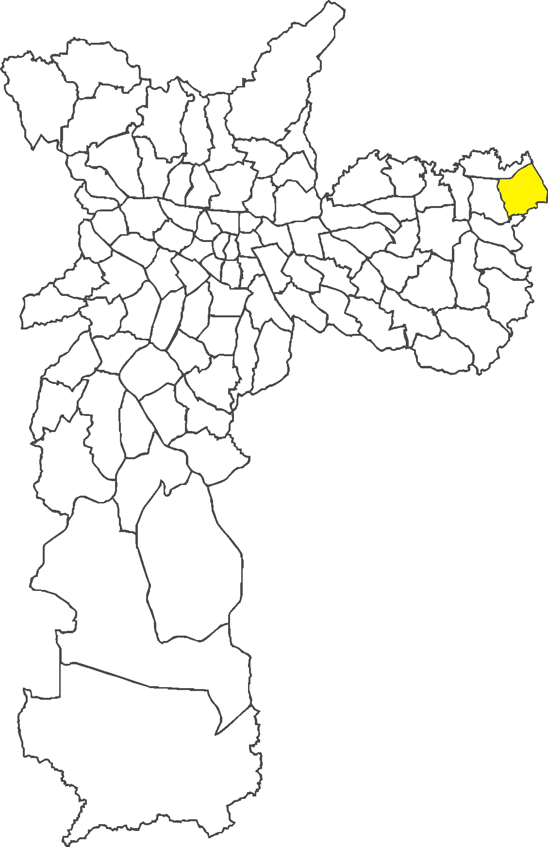 Localização do distrito de Itaim Paulista no município de São Paulo.